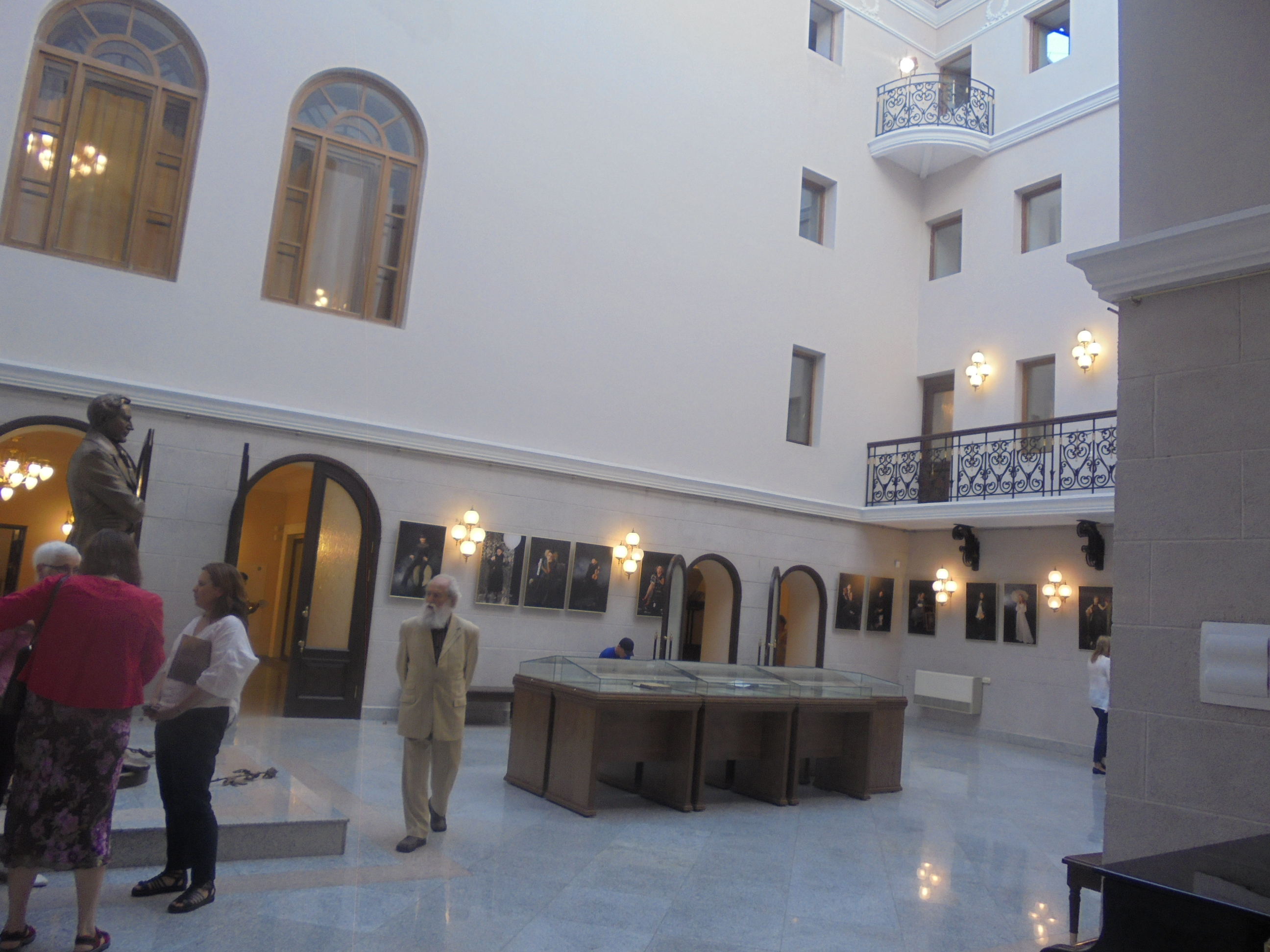 Интерьер